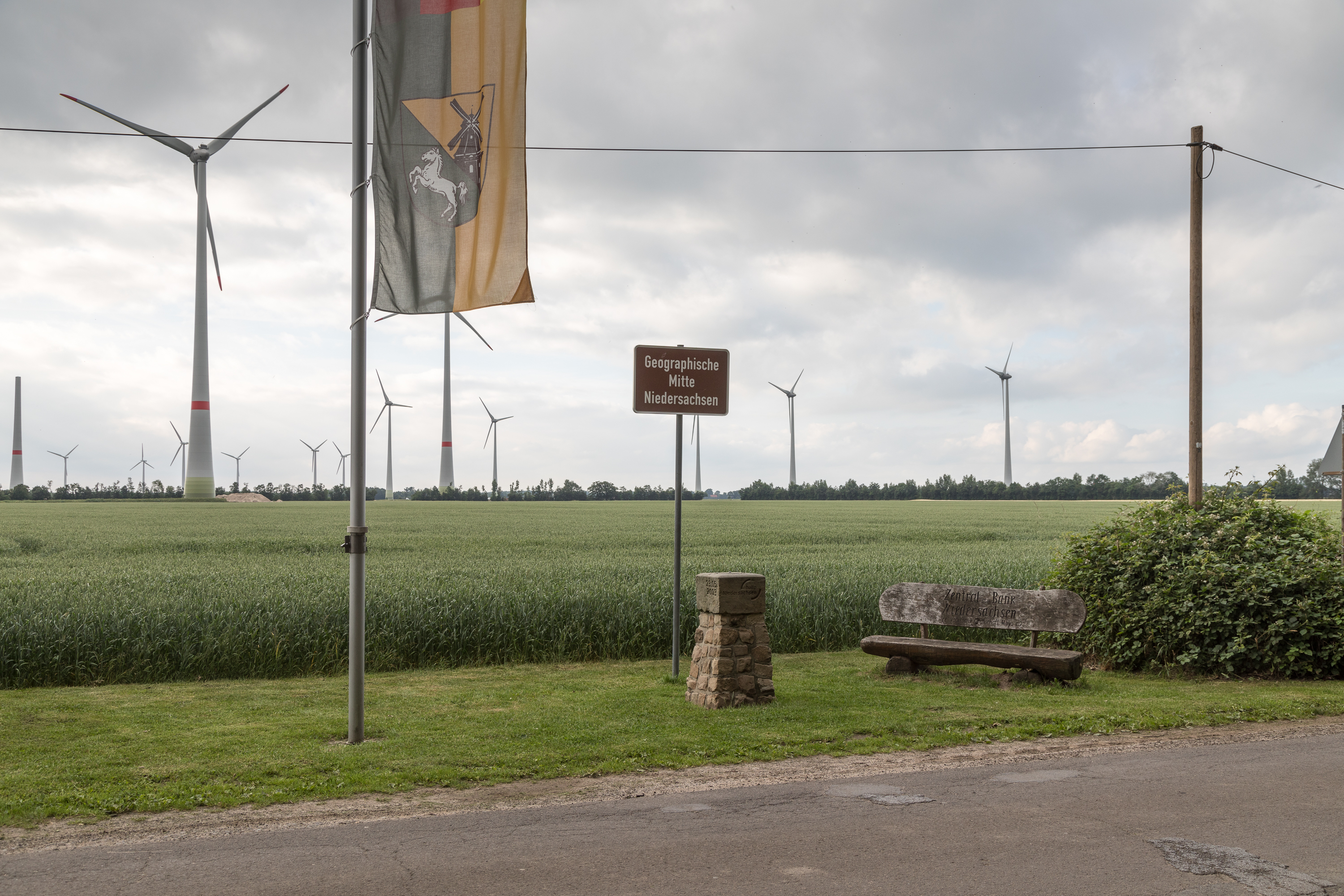 Der geografische Mittelpunkt Niedersachsens wird in Hoyerhagen verortet.